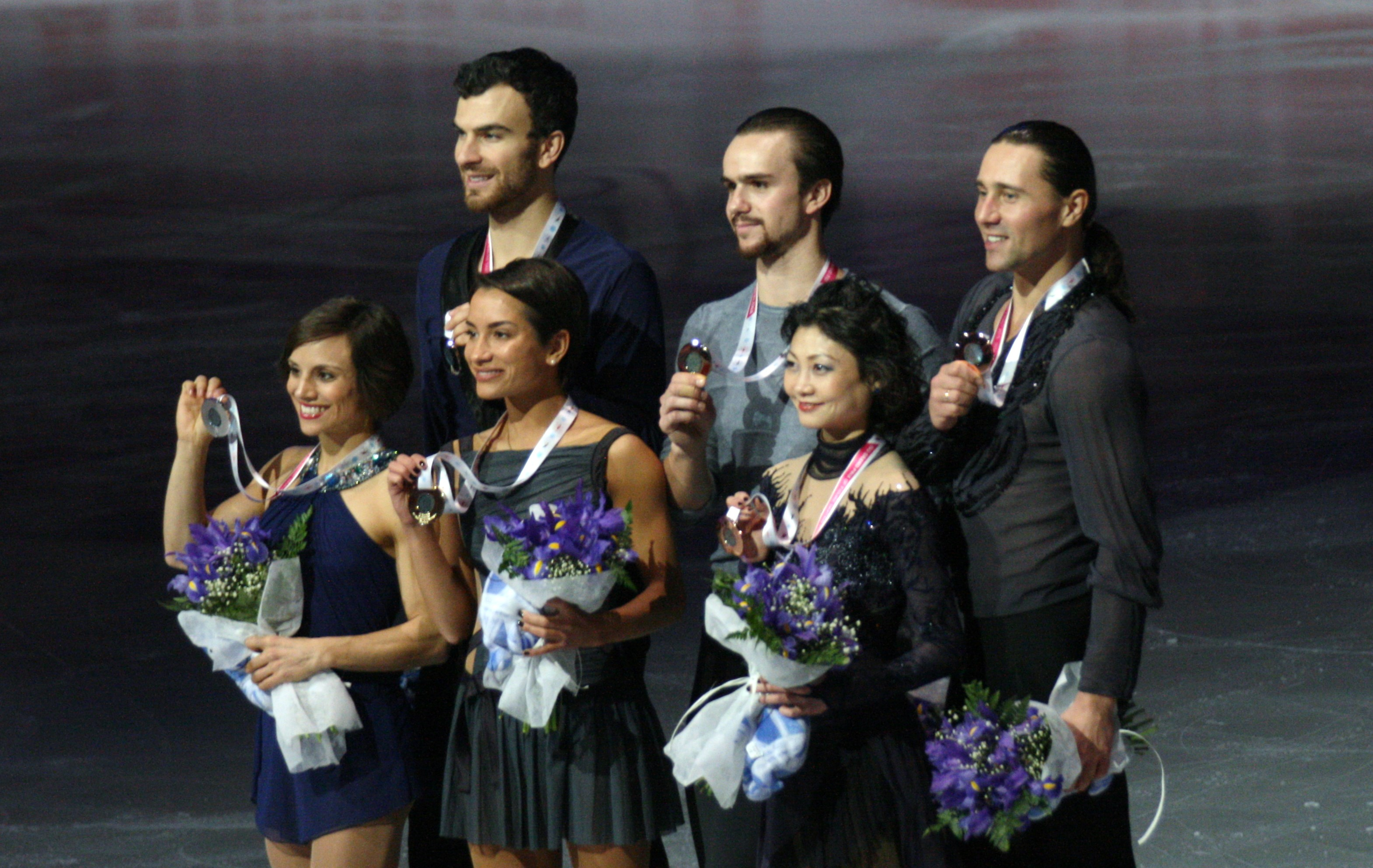 Церемония награждения победителей и призёров в парном катанию в финале Гран-при по фигурному катанию 2015-2016. Слева направо: Мэган Дюамель и Эрик Рэдфорд (Канада) - 2е место, Ксения Столбова и Фёдор Климов (Россия) - 1е место, Юко Кавагути и Александр Смирнов (Россия) - 3е место.